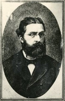 František Slaměník (1845 - 1919), Český pedagog a komeniolog.